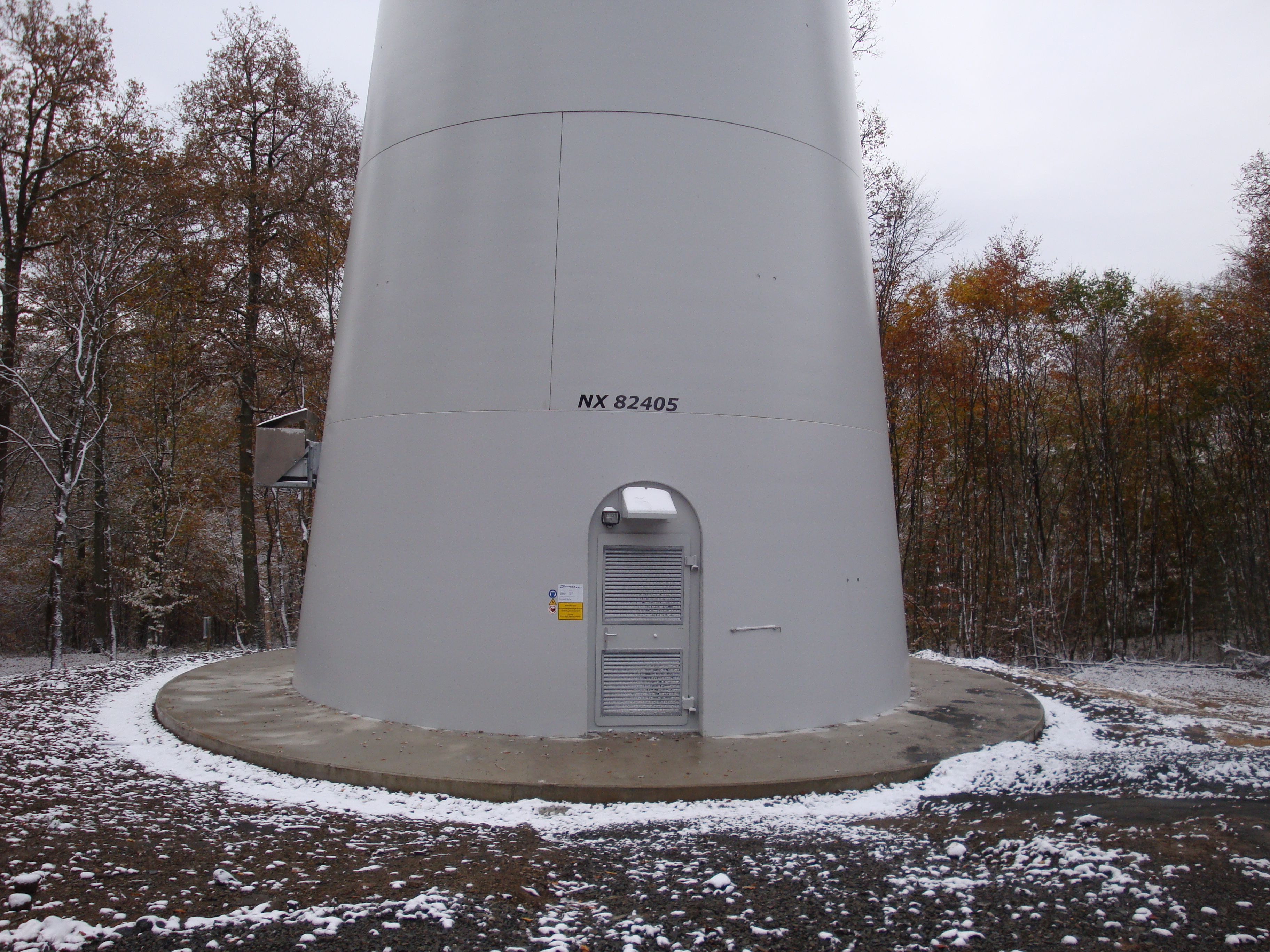 Turmfuß mit Eingang einer Nordex N117, Windpark Hohenahr